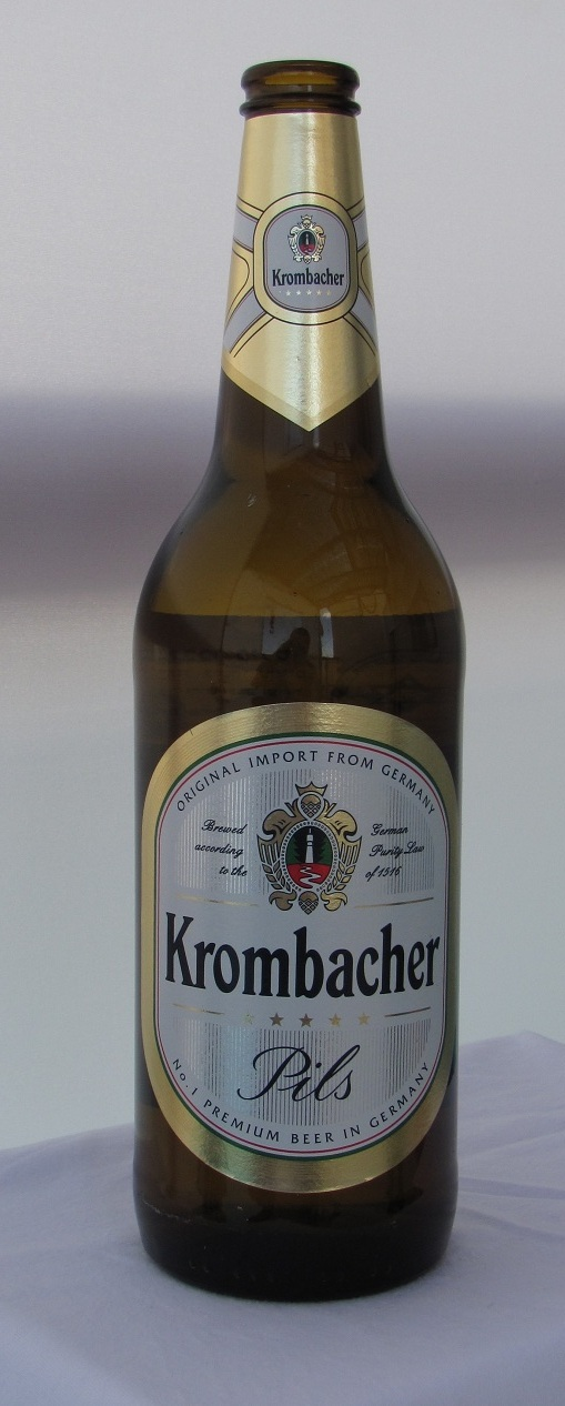 стеклянная бутылка немецкого пива Krombacher